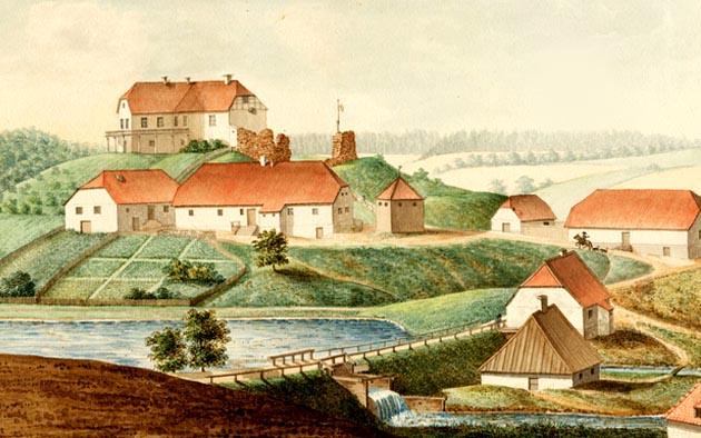 No